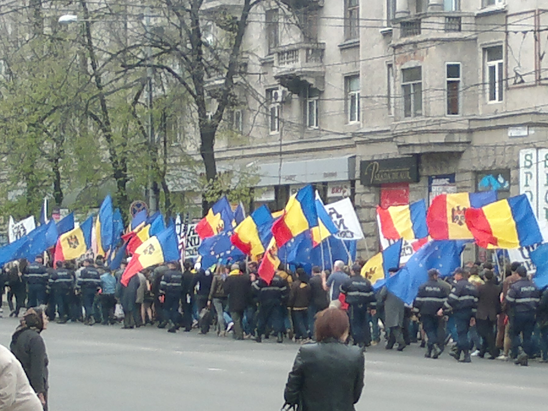 Romani: Manifestație pro-europeană la Chișinău, 6 aprilie 2014